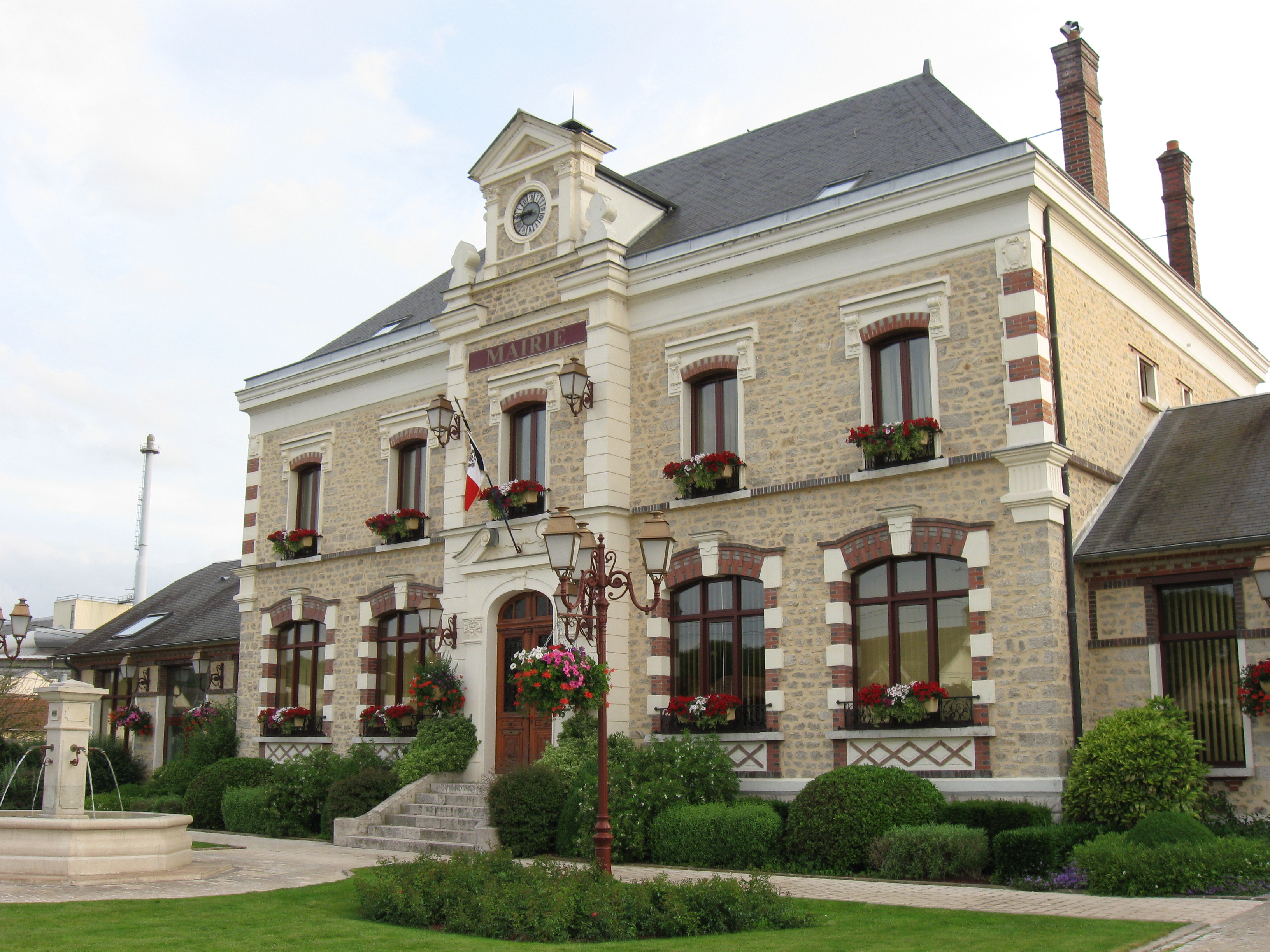 Mairie de Bagneaux-sur-Loing (département de la Seine et Marne, région Île-de-France).